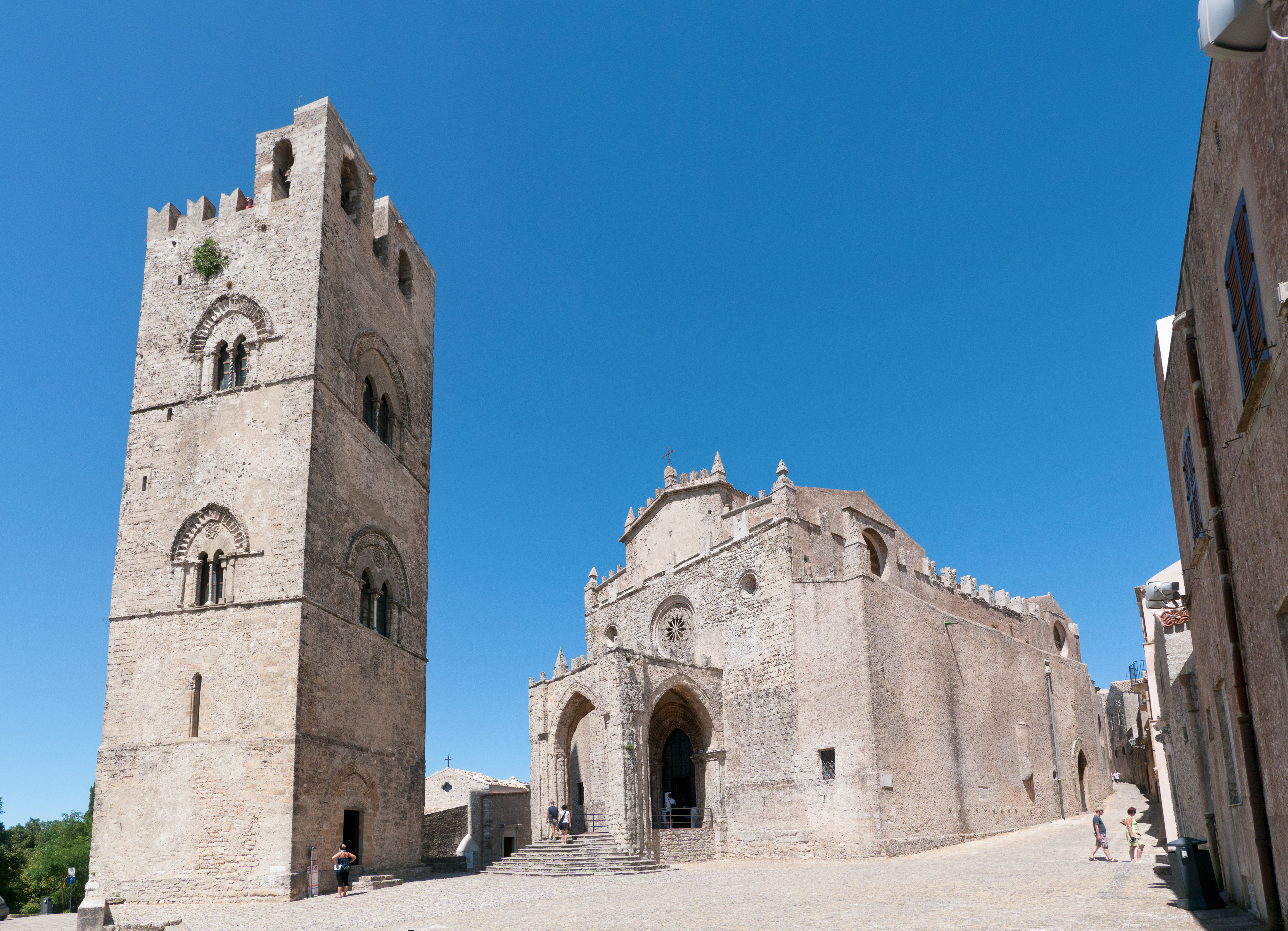 Erice Churches